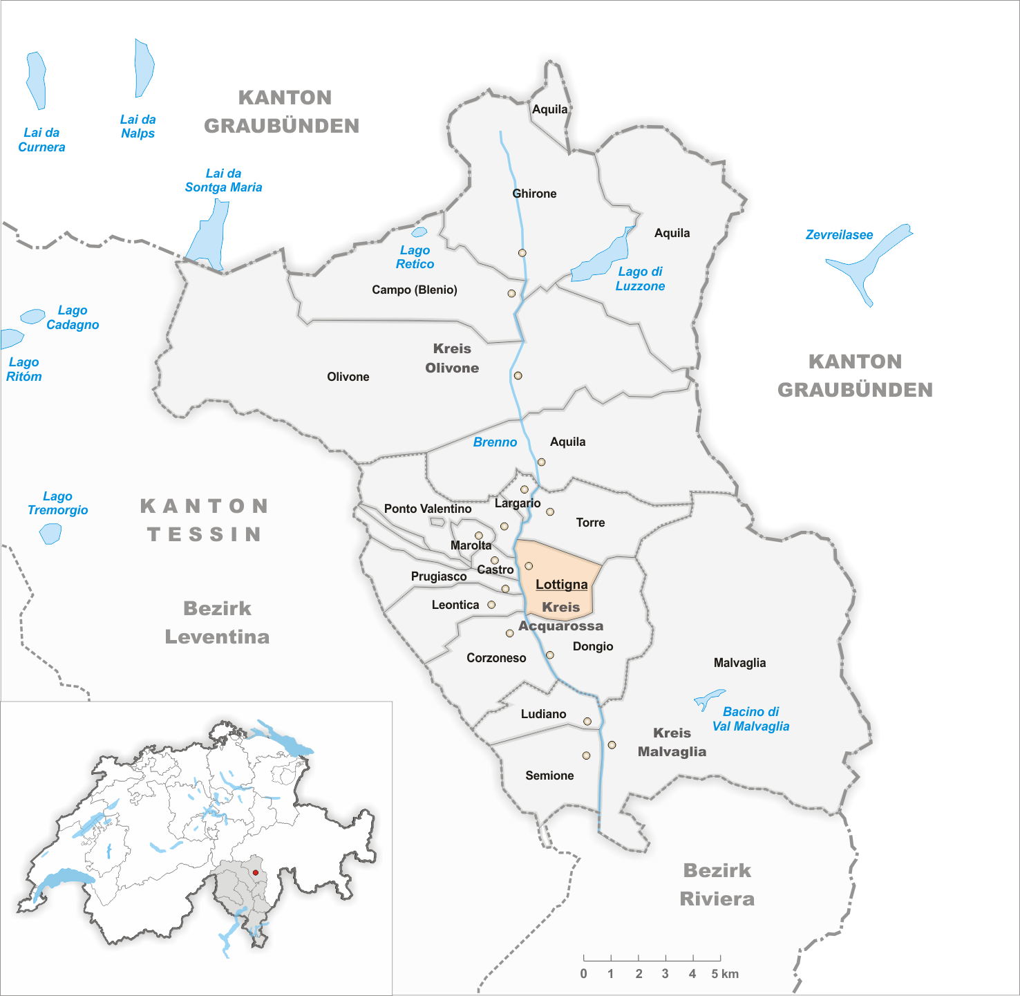 Municipality Lottigna